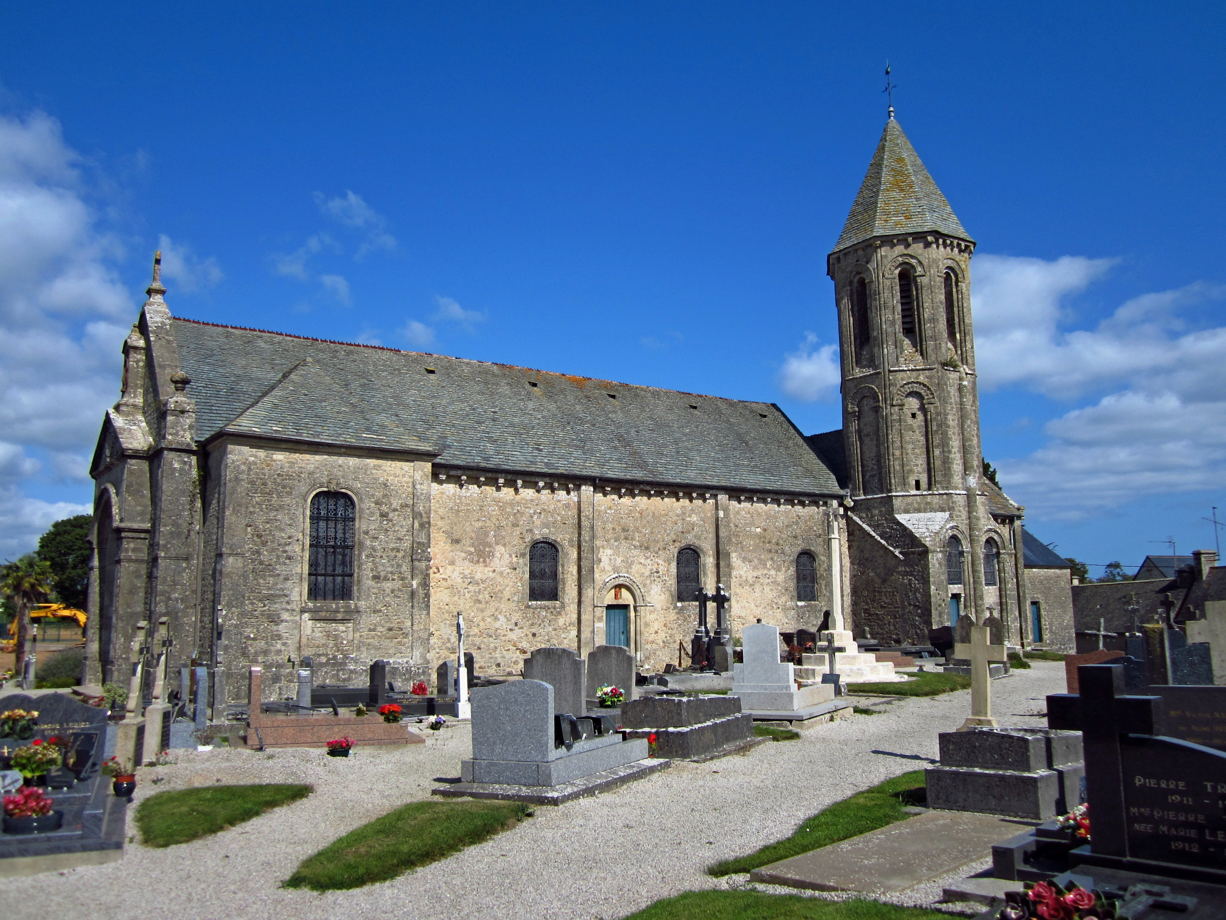 Église Notre-Dame-de-l'Assomption de Tamerville (style roman) .